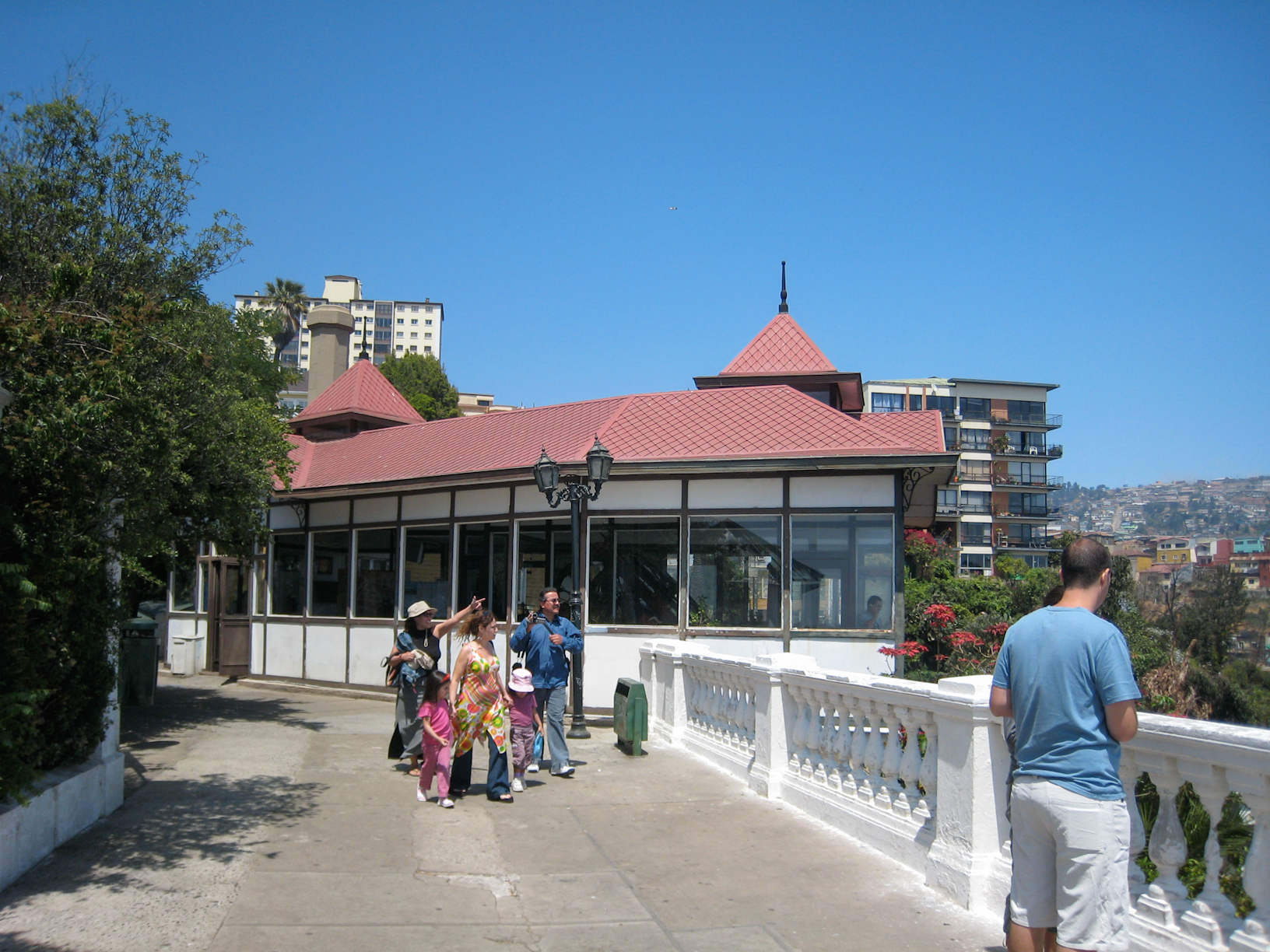 Cerros Alegre. This is a photo of a national monument in Chile: 606